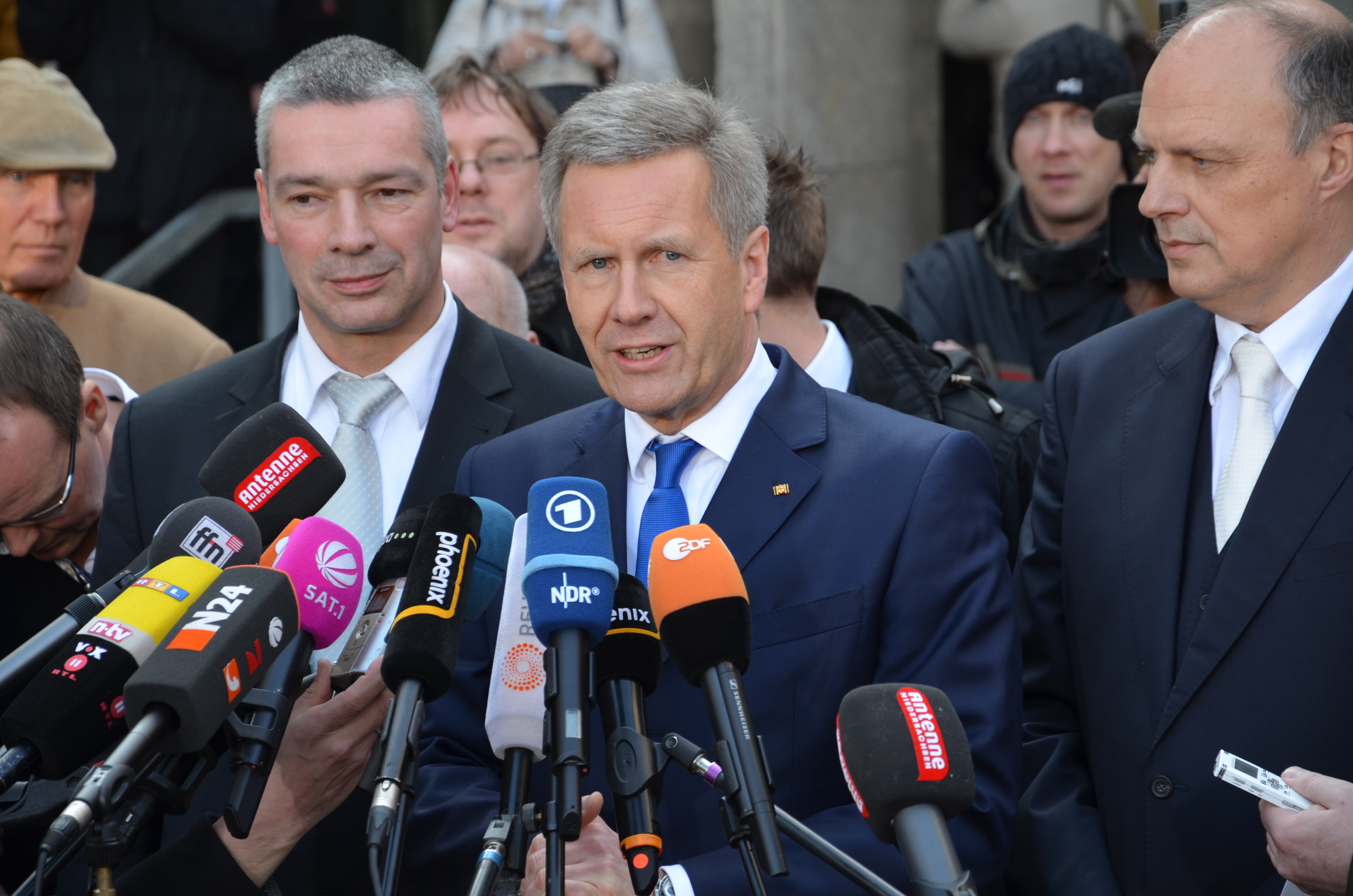 Nach seinem Freispruch durch das Landgericht Hannover trat Ex-Bundespräsident Christian Wulff, hier mit seinen beiden Verteidigern Rechtsanwalt Bernd Müssig (links) und Michael Nagel, vor die laufenden Kameras und gab sich erleichtert, „[...] dass sich [...] das Recht durchgesetzt hat.“